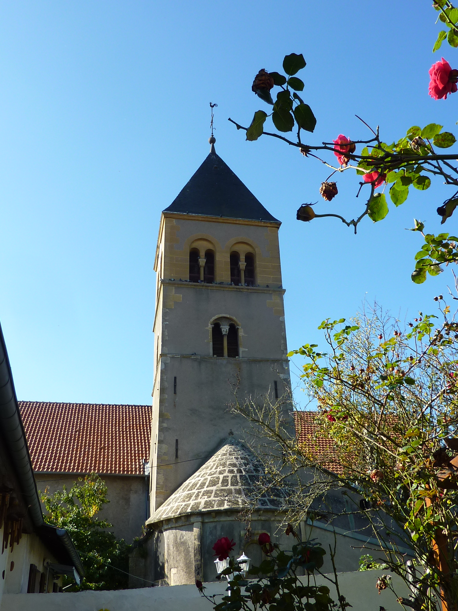 Église Sainte-Lucie de Vallières